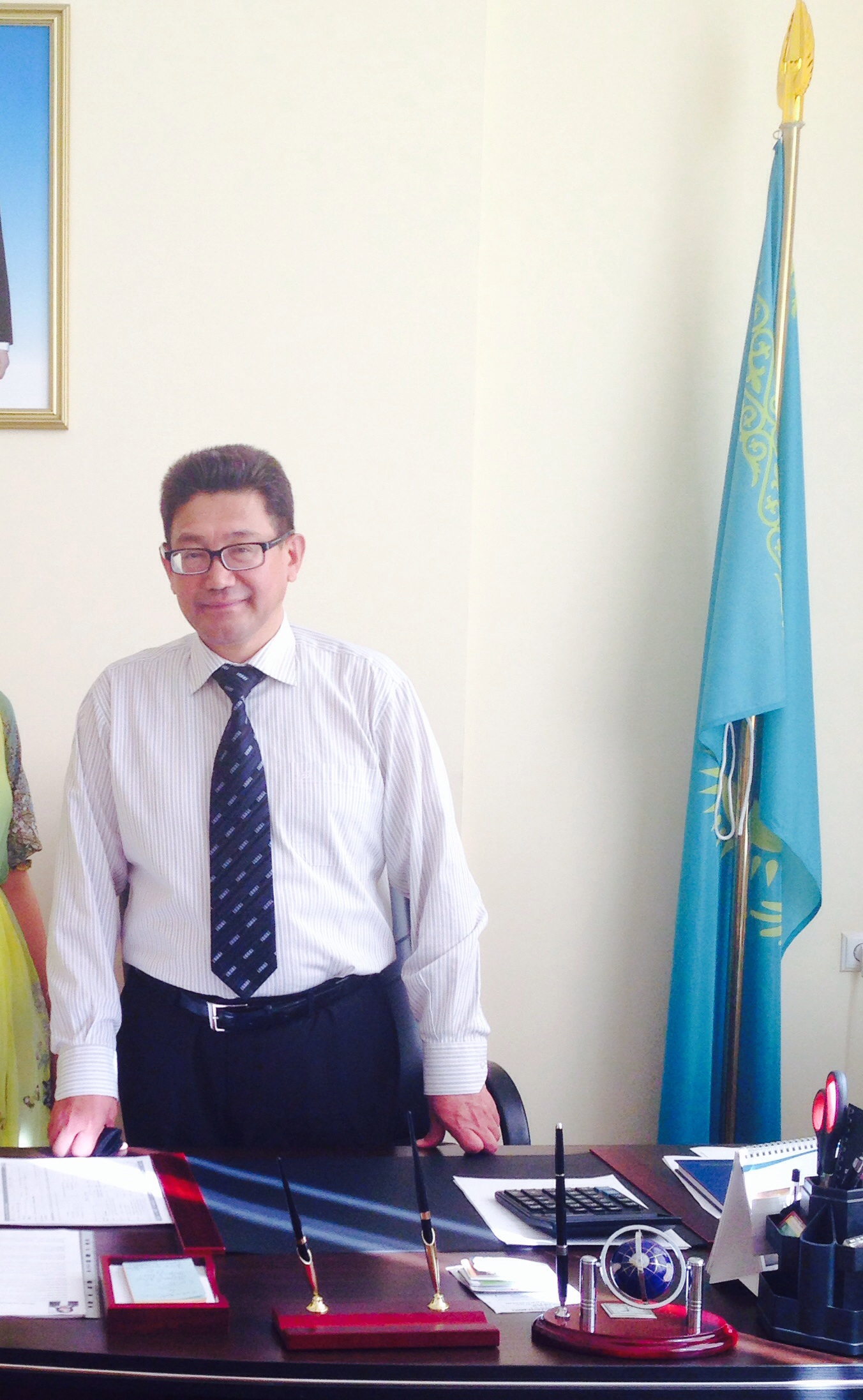 Лицей директор